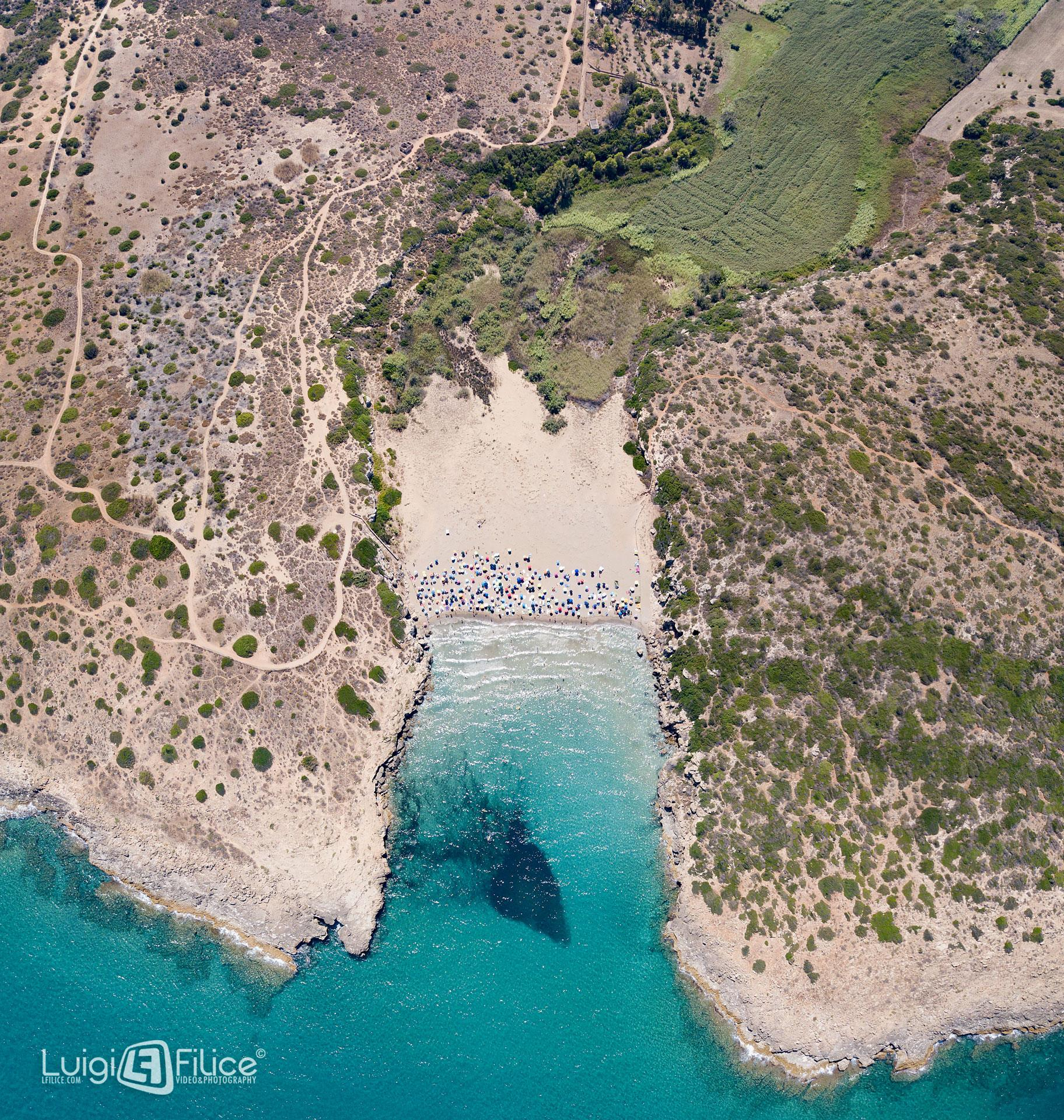 Calamosche